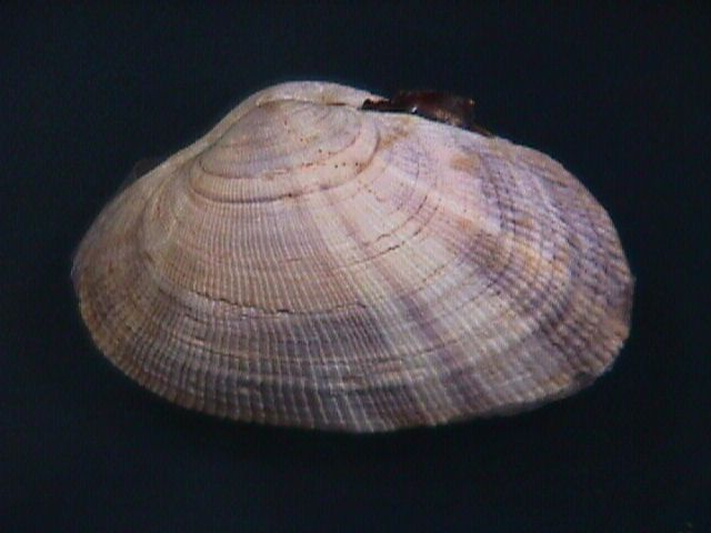 Asaphis deflorata isla de Margarita, estado Nueva Esparta - Venezuela